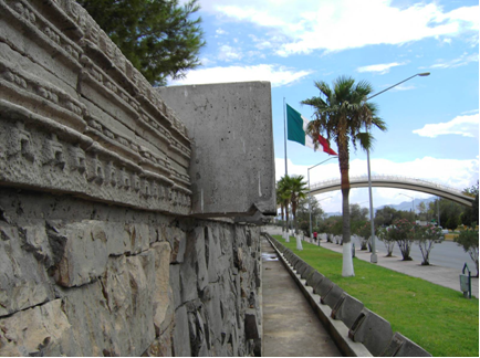 av. abraham lincoln 2